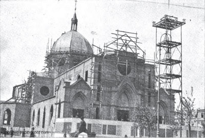 Campanario de Catedral de Valparaíso en construccion.